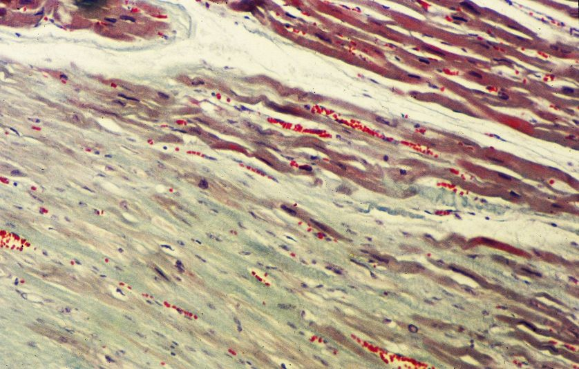 Fibrosi d'origen postviral al feix de His, causant d'una arítmia fatal. Microscopi òptic. 200X. Tinció: Tricròmic de Masson.